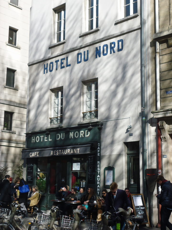 Hôtel du Nord 2016